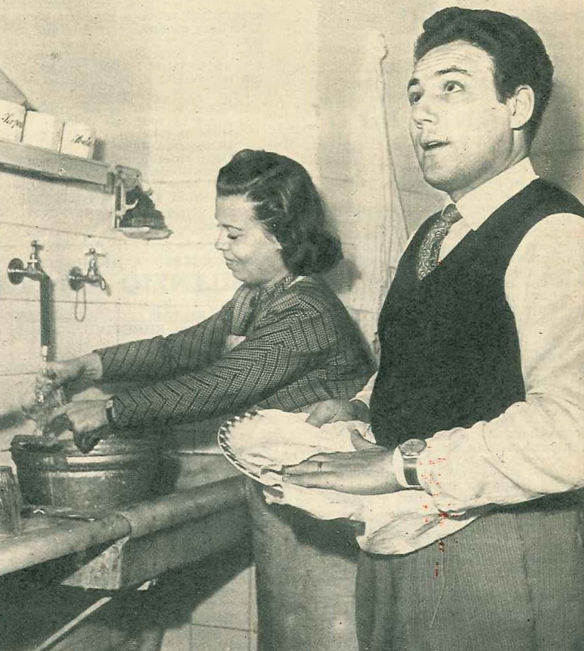 Claudio Villa in casa con la moglie Miranda Bonansea nel 1955 Licensing 1955